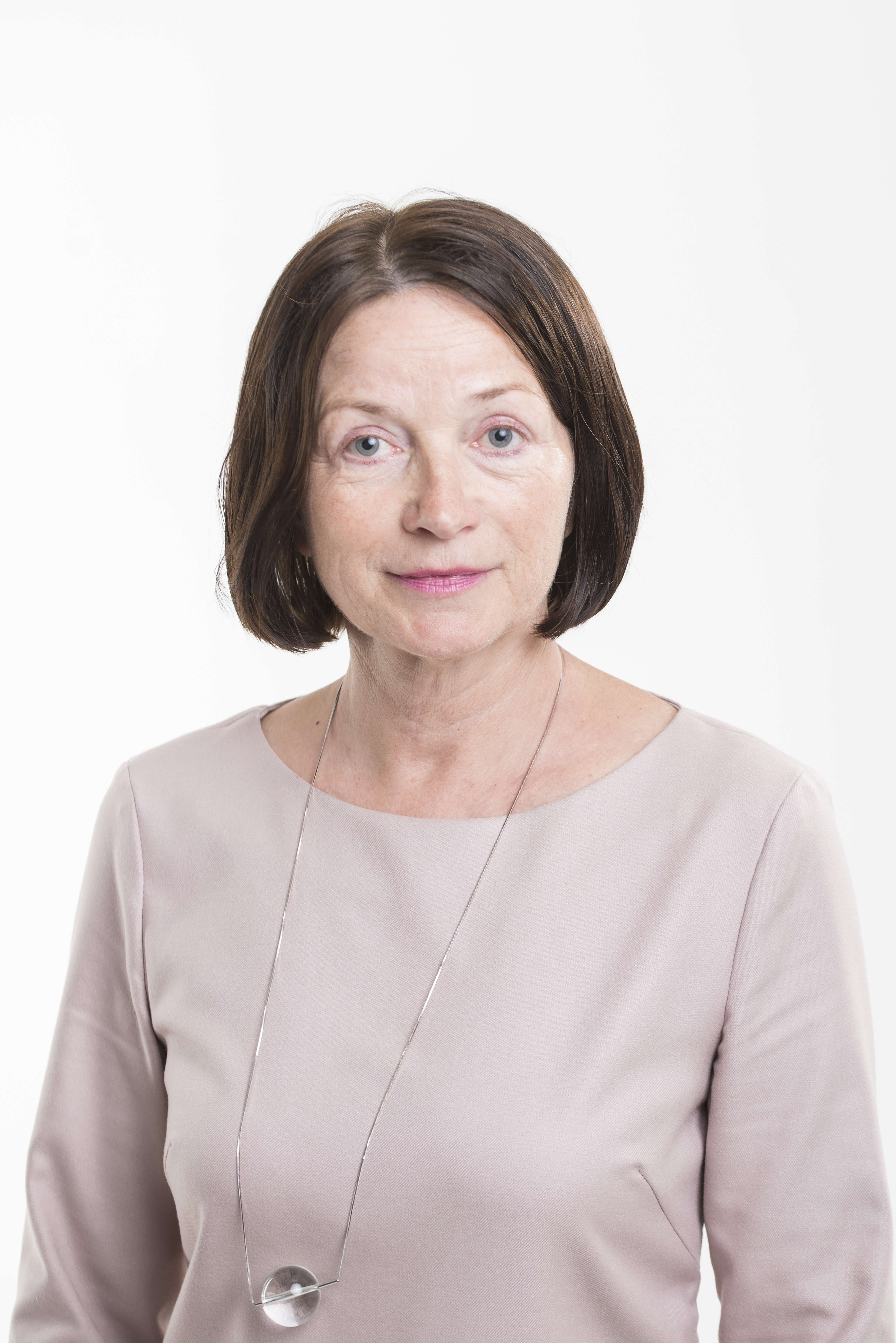 2017.gada 21.jūlijs. 12.Saeimas deputāte Astrīda Harju. Foto: Reinis Inkēns, Saeimas Administrācija Izmantošanas noteikumi: saeima.lv/lv/autortiesibas